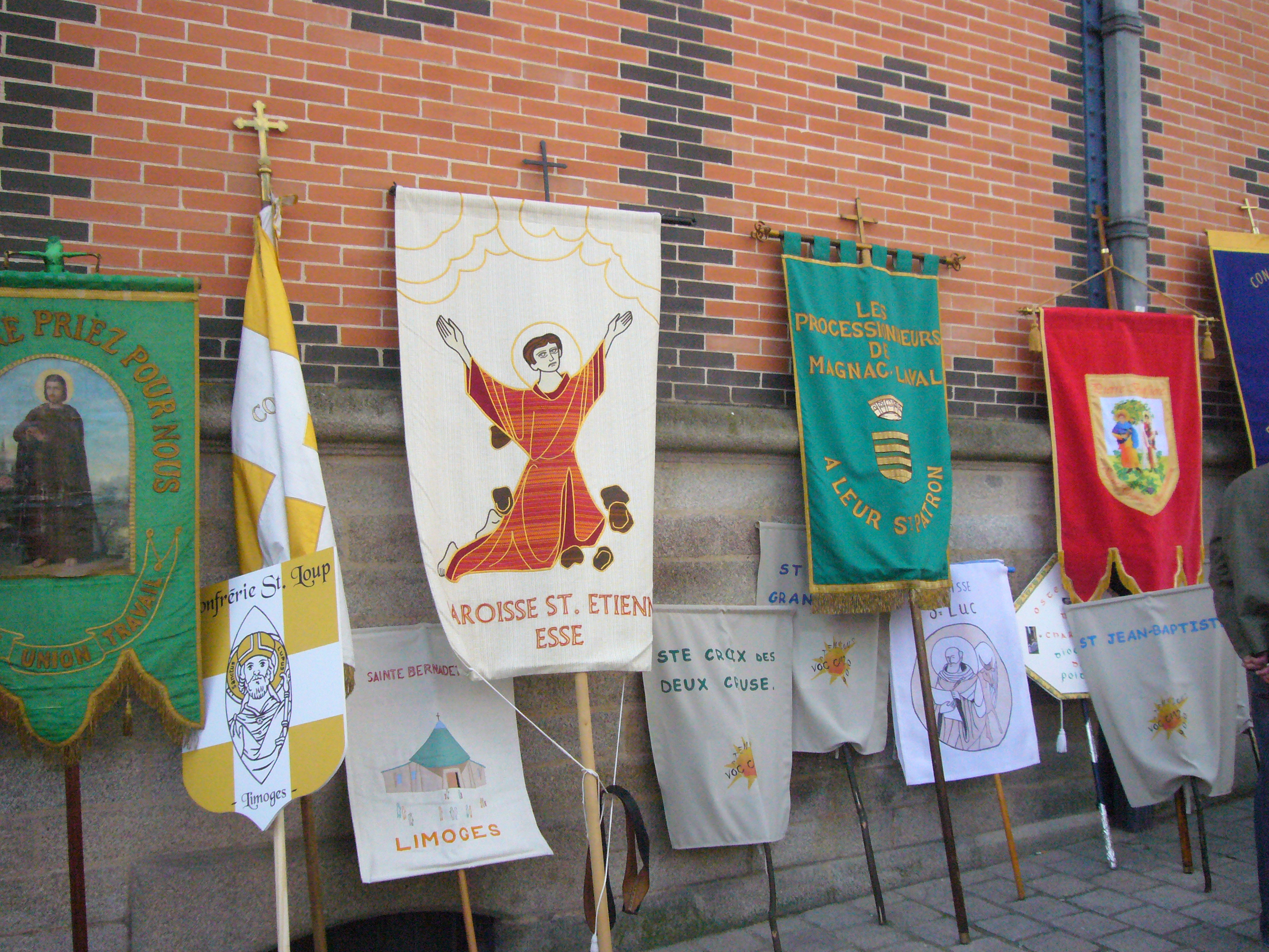 Bannières des paroisses et des communes ostensionnaires lors des Ostensions 2009 à Limoges (87, France)